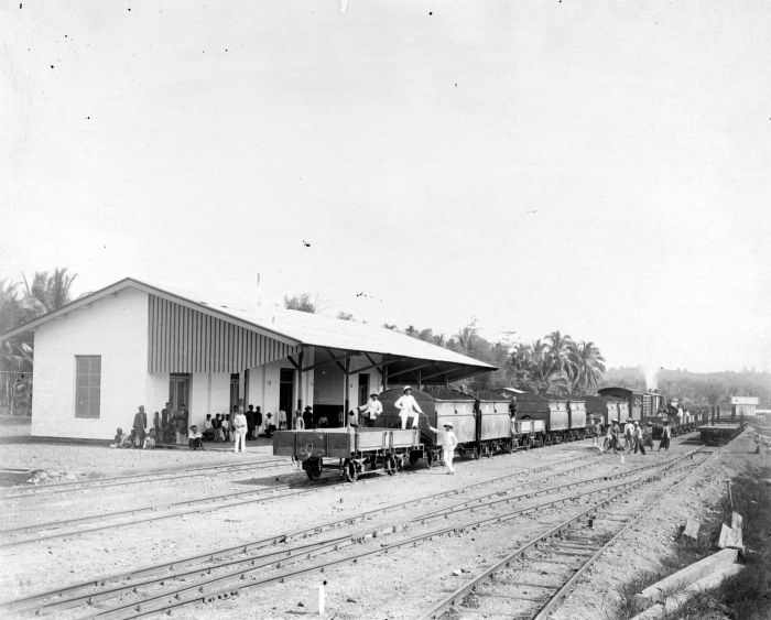 Negatief. Het treinstation van Solok waar een goederentrein met spoorweg materieel stil staat. Op het station wachten mensen.. Een goederentrein met spoorwegmaterieel bij het station van Solok aan de west kust van Sumatra